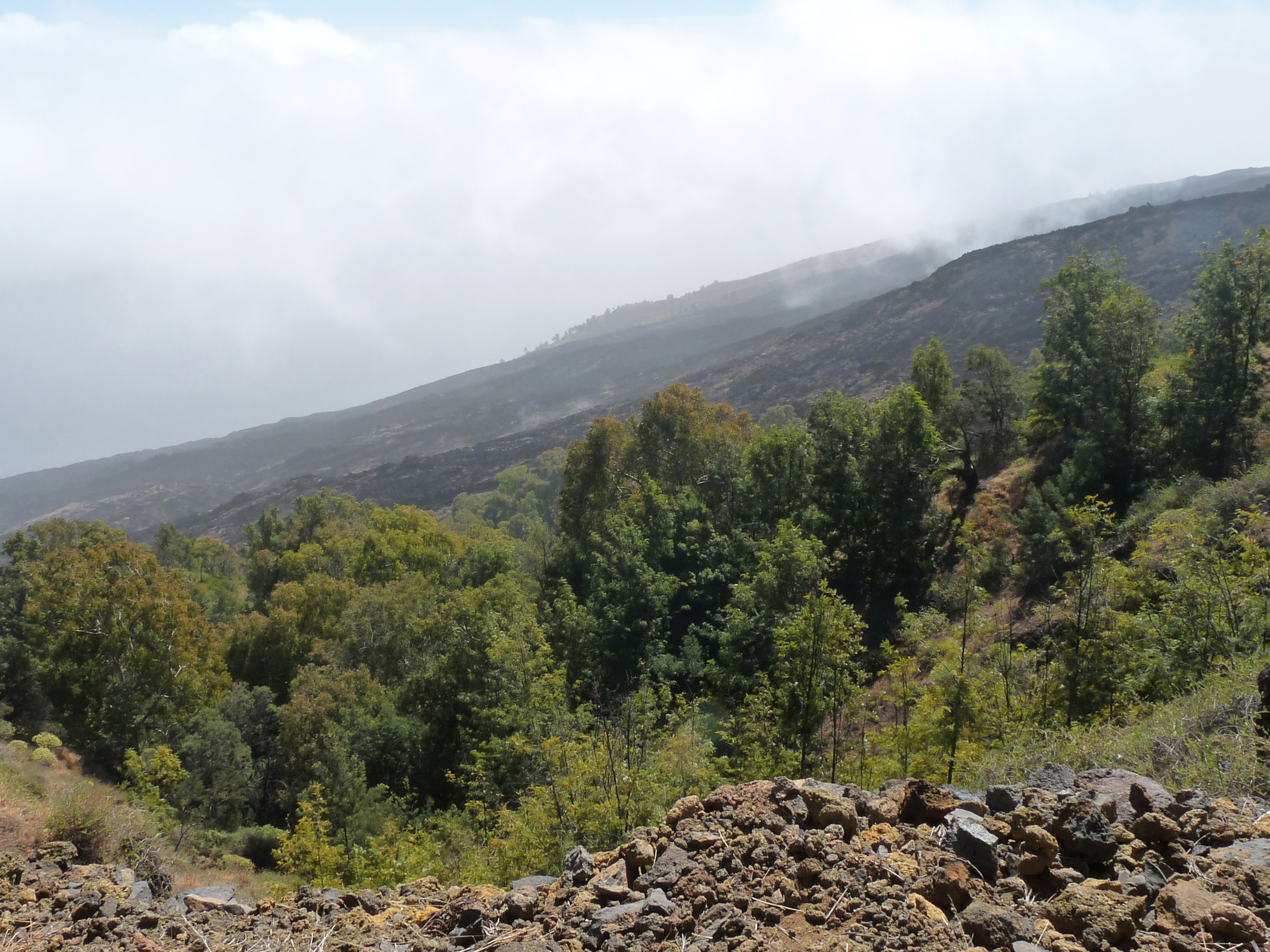 Monte Velha (île de Fogo, Cap-Vert)